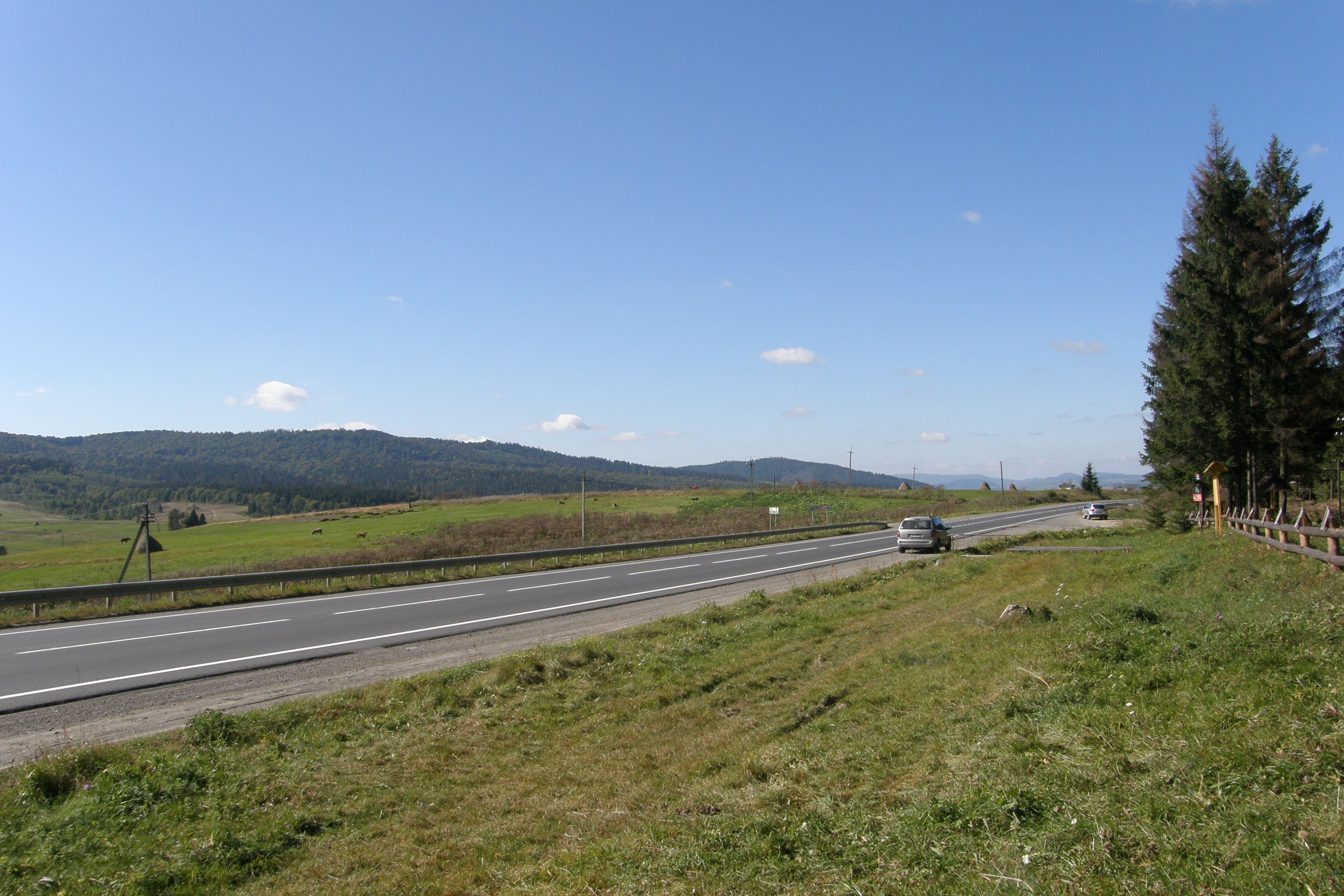 Die M06 in den Ukrainischen Karparten